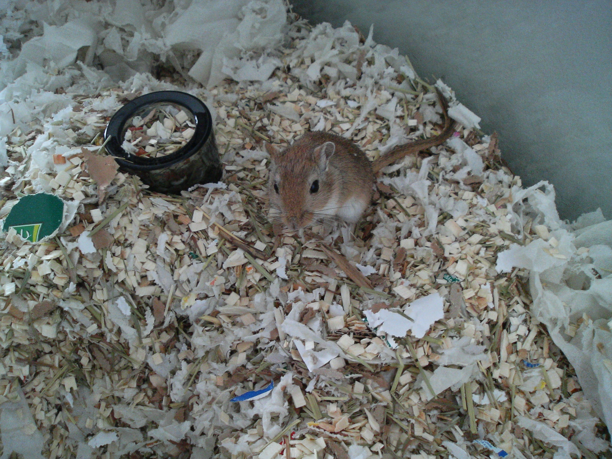 An agouti gerbil standing.